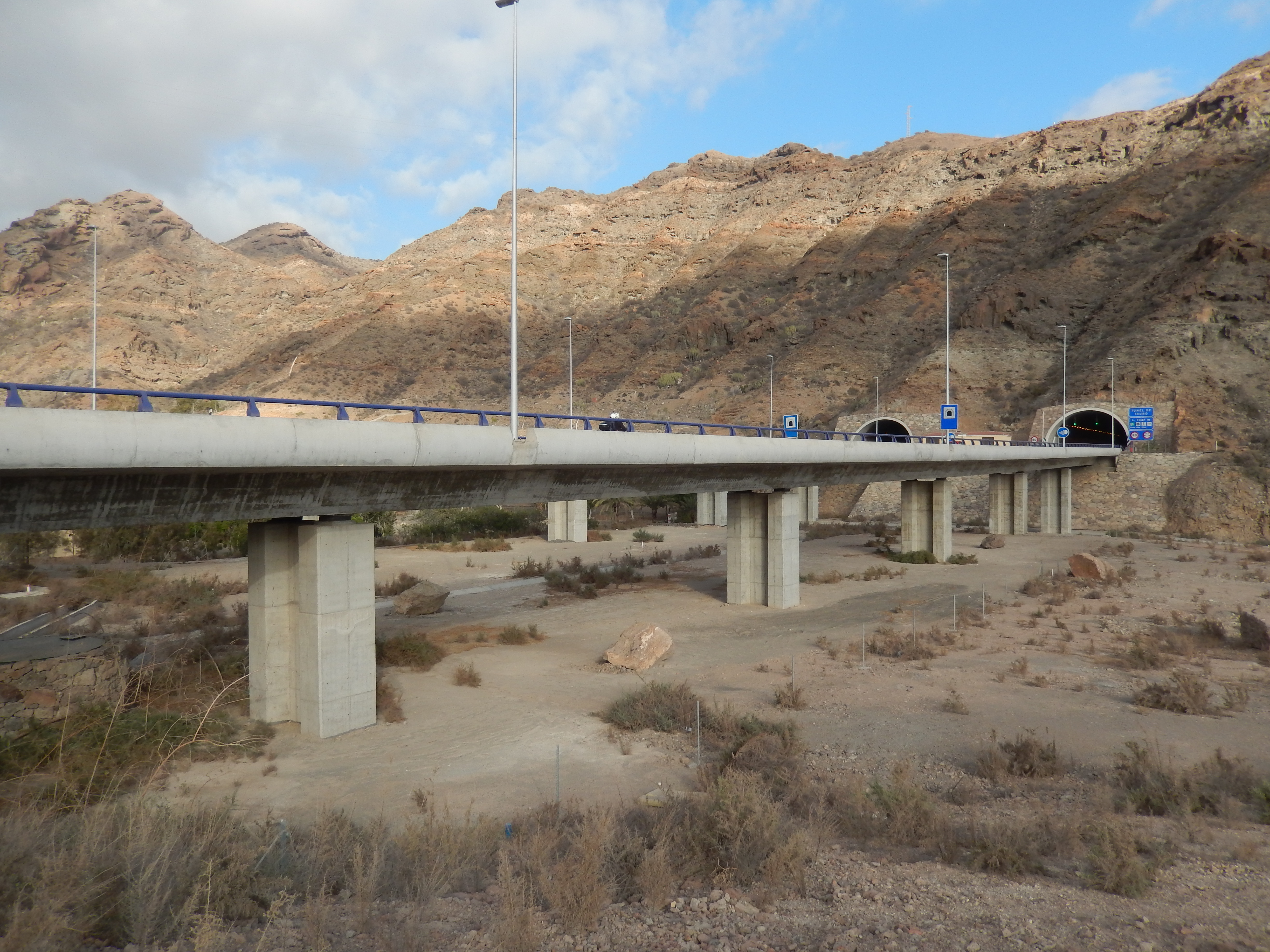 Gran Canaria GC-1 Bridge over Barranco de Tauro